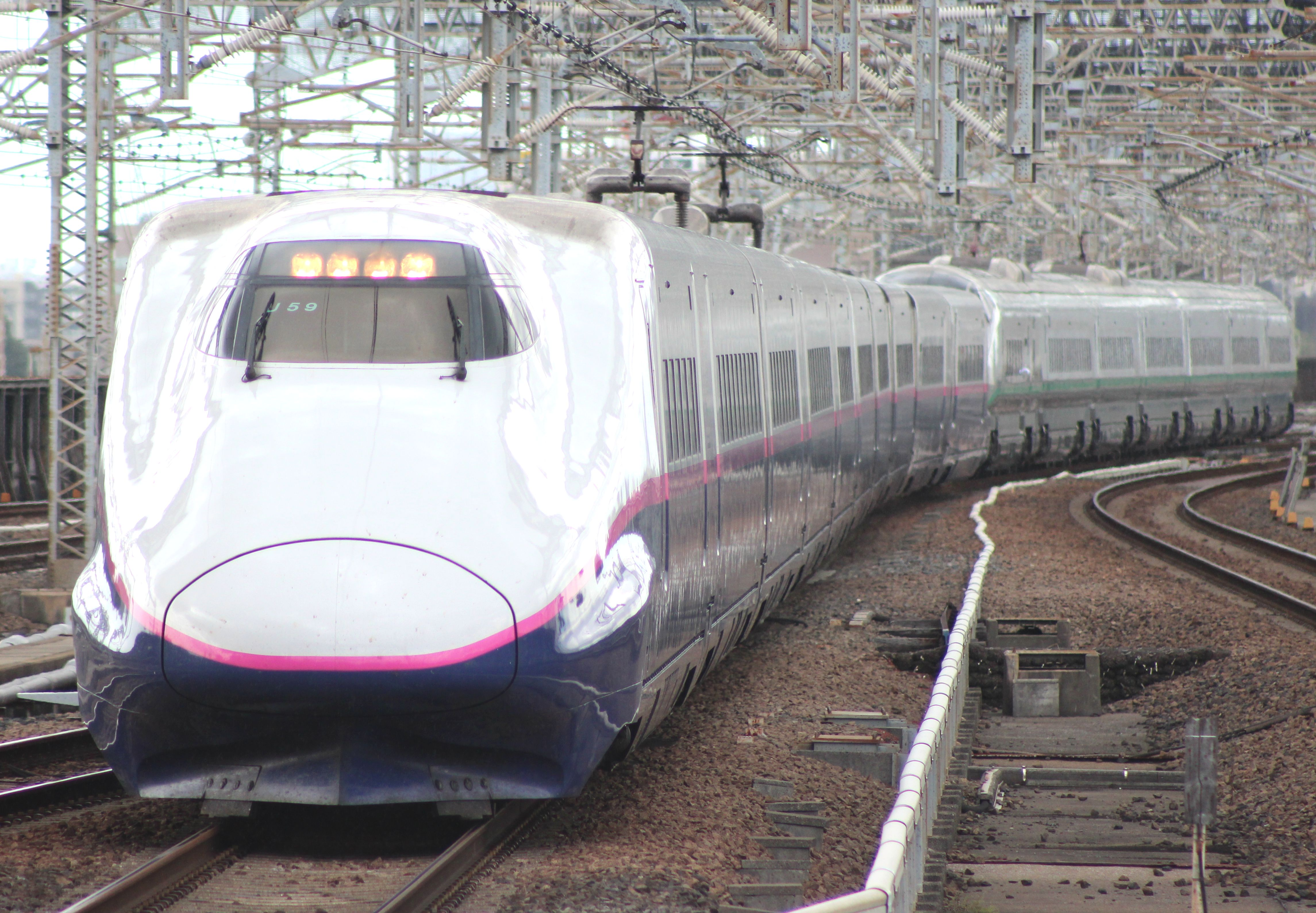 新幹線E2系電車